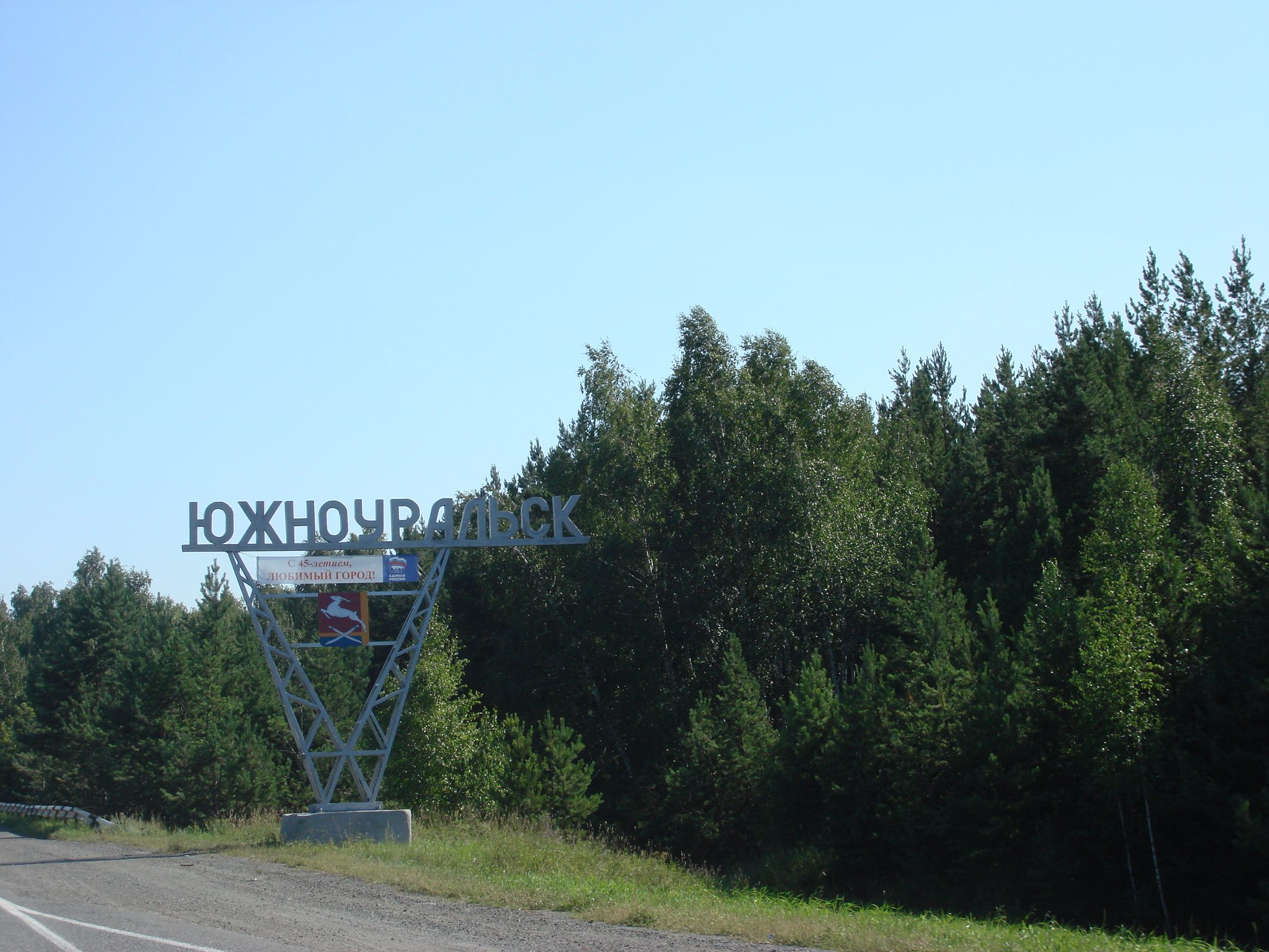 Знак при въезде в город